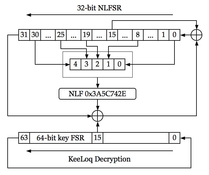 Декодировка